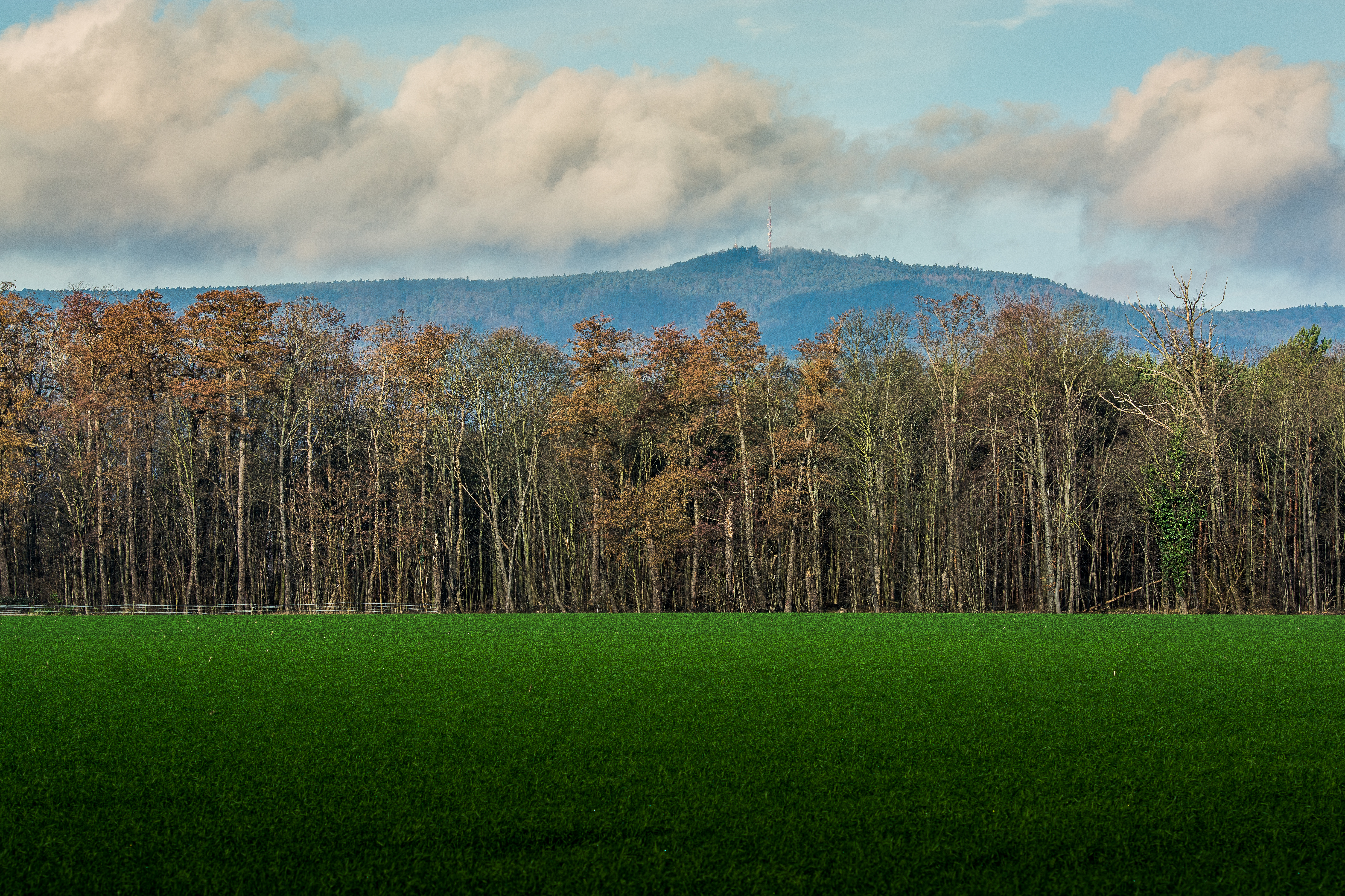 Der Ordenswald, dessen Name sich von einem geistlichen Ritterorden herleitet, ist eine Waldfläche im Südosten von Rheinland-Pfalz. Er liegt in der vorderpfälzischen Rheinebene überwiegend auf den Gemarkungen der kreisfreien Stadt Neustadt an der Weinstraße und der Gemeinde Haßloch. Das Gebiet ist geschützt durch die Rechtsverordnung über das Landschaftsschutzgebiet LSG 3.027 „Rehbach-Speyerbach“